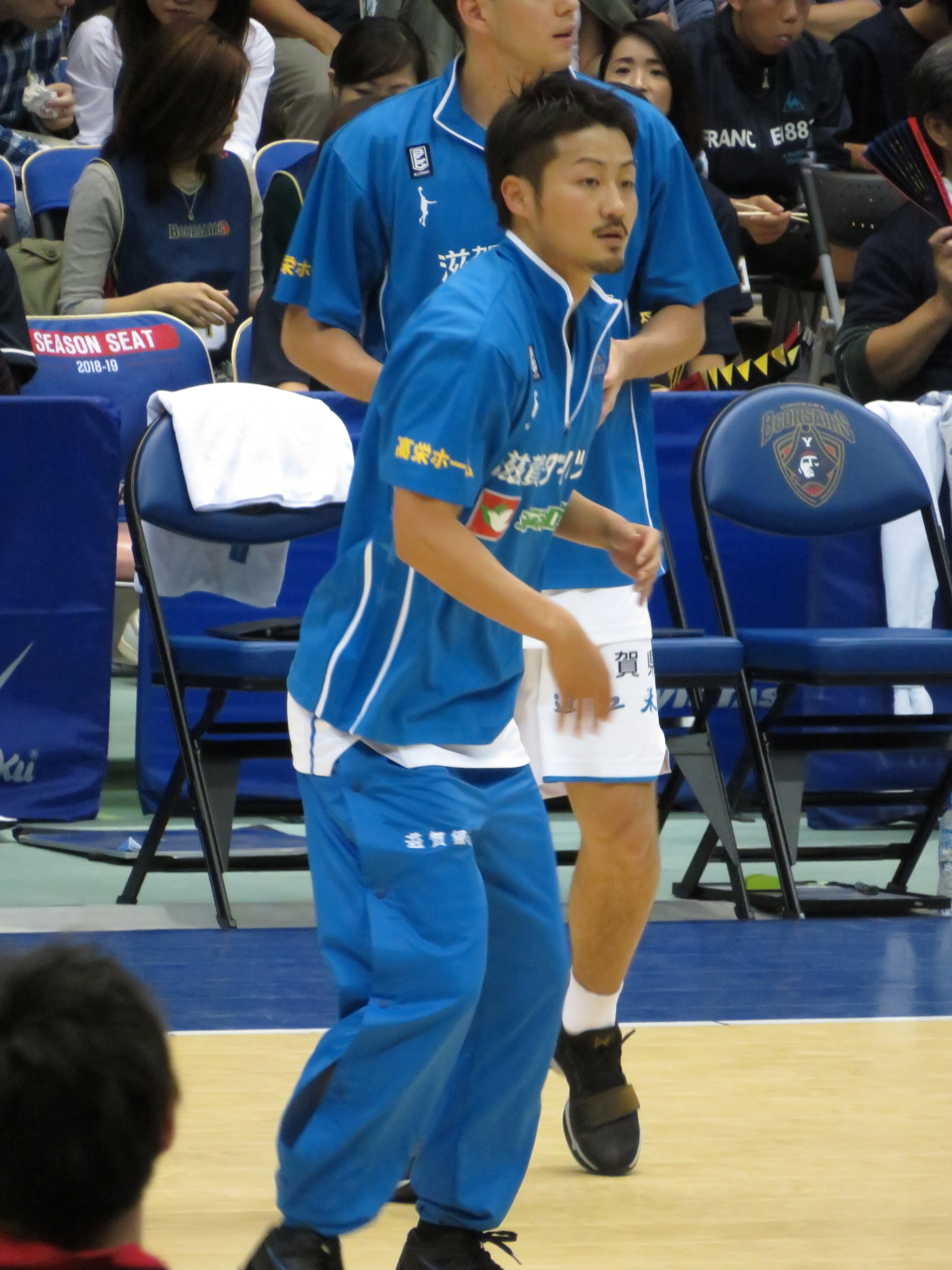 2018年 10月20日 2018-19 B1 第三節 横浜-滋賀 横浜国際プール